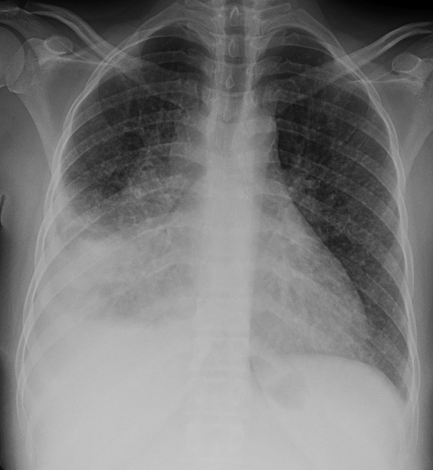 Door/namens mij gemaakte en bewerkte foto van een anonieme patient met toestemming van de instelling waar de foto is gemaakt. Licentie: GFDL